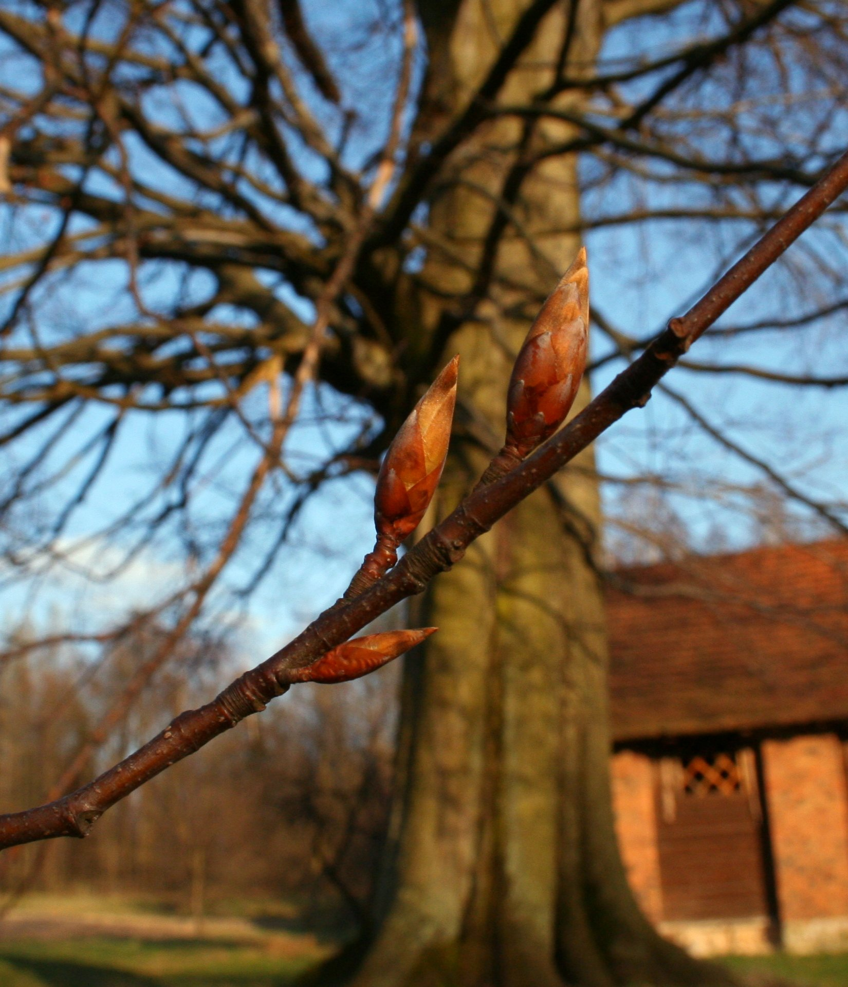 Fagus sylvatica, Park Krajobrazowy Lasy nad Górną Liswartą, Poland